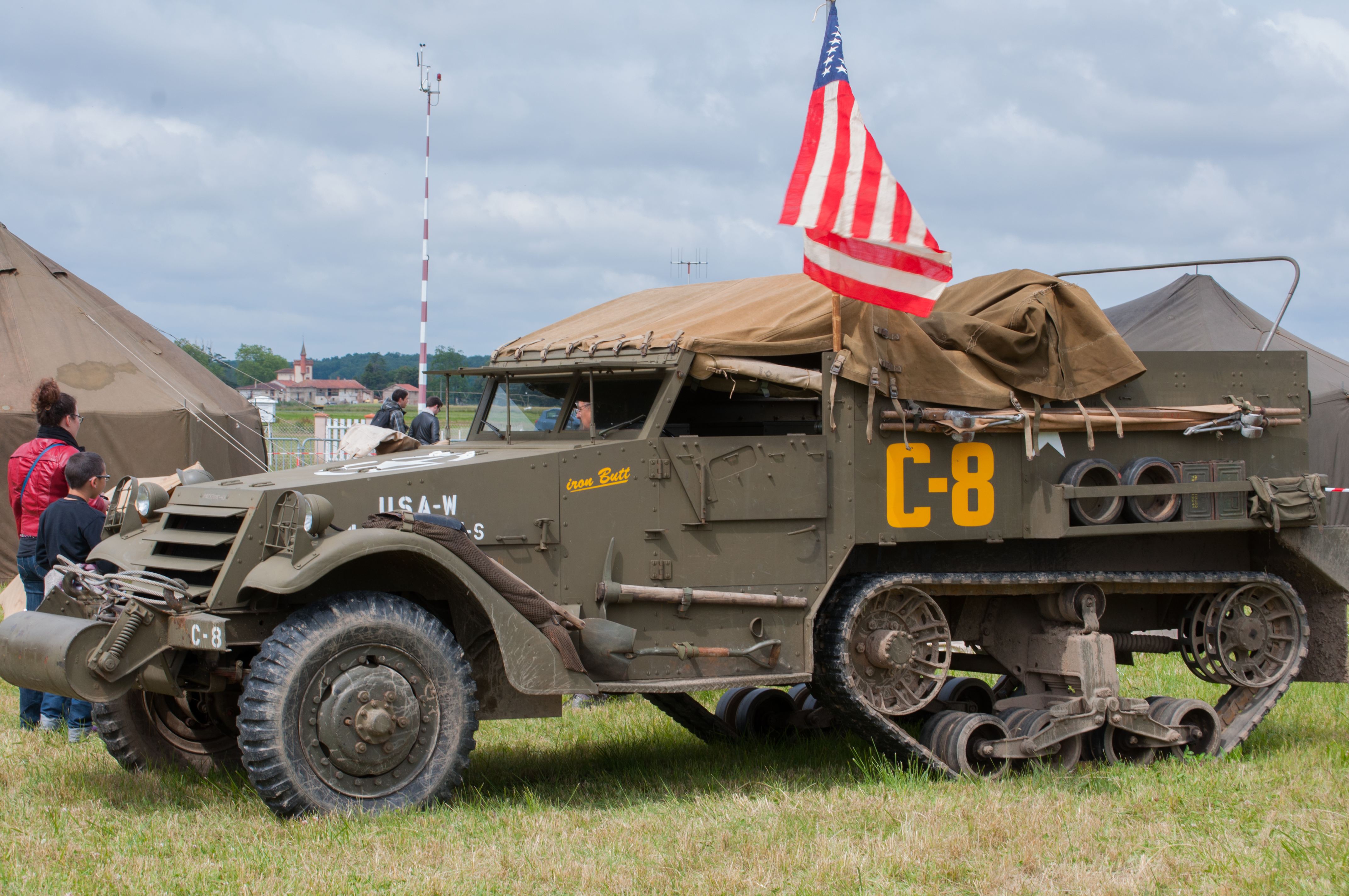 AirExpo 2014 - Iron Butt